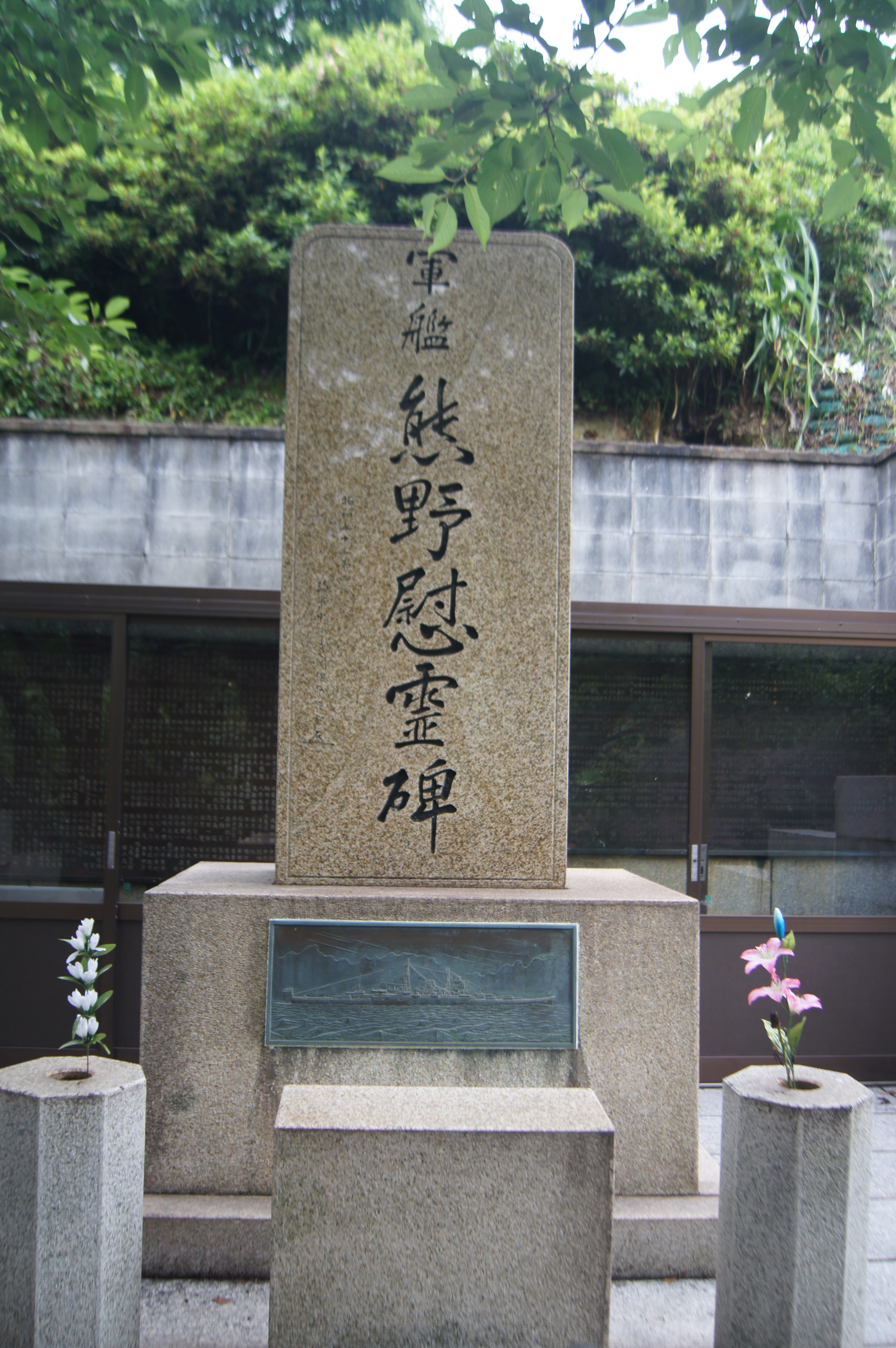 熊野 (重巡洋艦)の慰霊碑（呉)